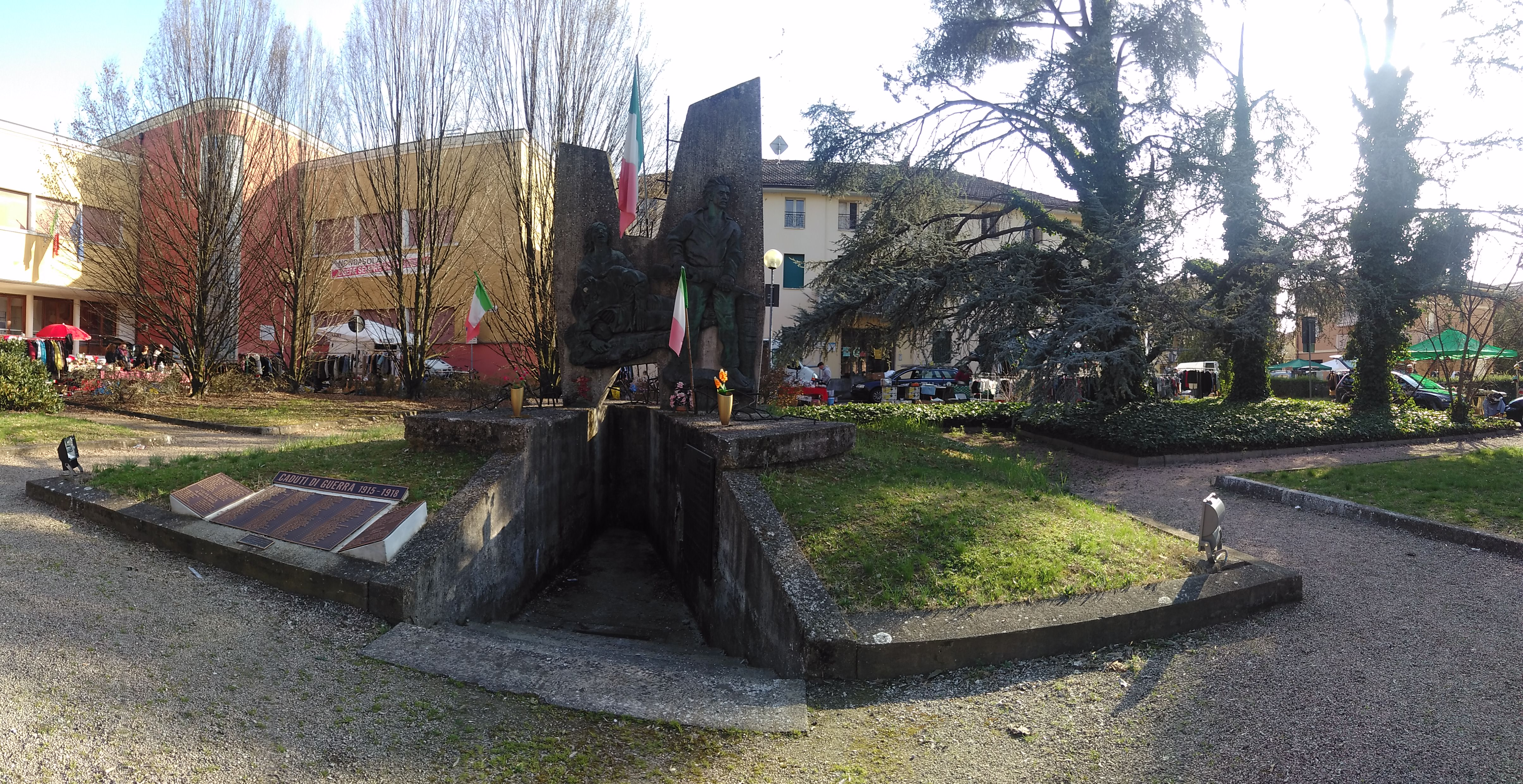 Il Monumento alla Resistenza a Cadelbosco di Sopra